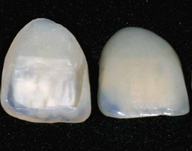 Veneer